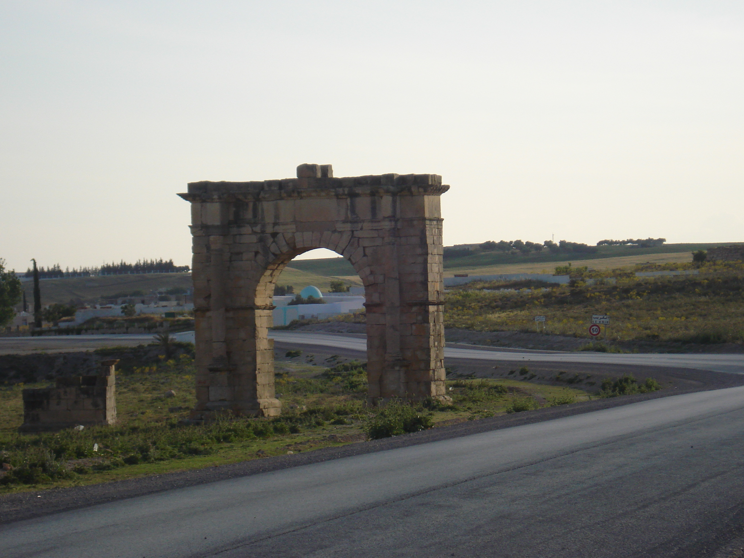 El Krib entrance (Tunisia)